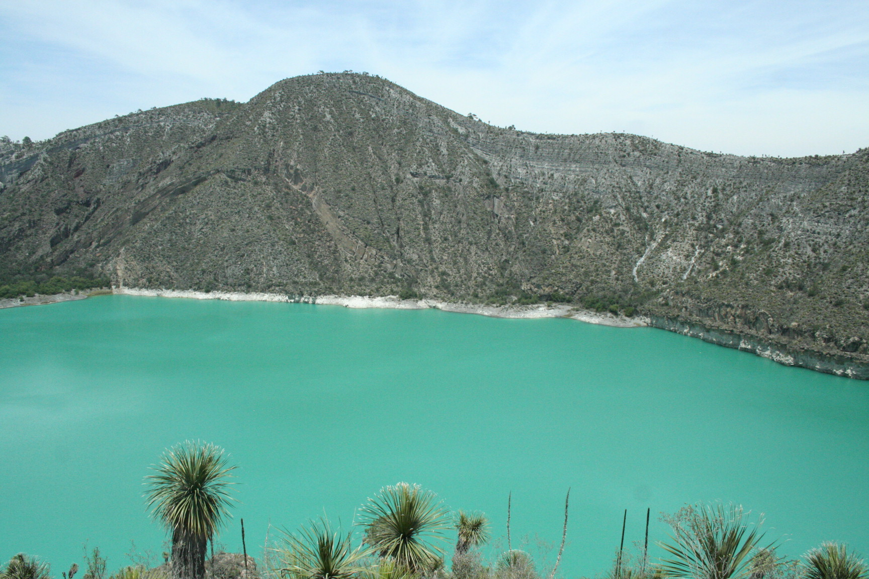 Lago cráter (Atexcac) del estado de Puebla, México. Volcanic lake (Atexcac) in Puebla, México.